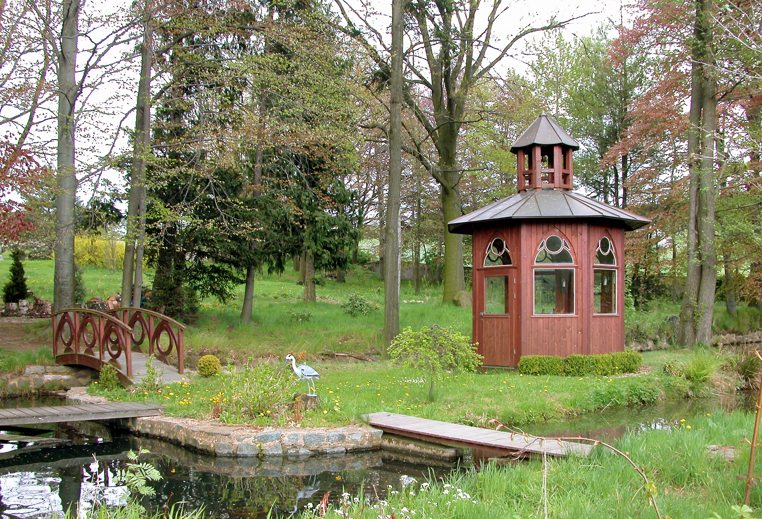 03.05.2008 02633 Arnsdorf (zu Gaußig, Gemeinde Doberschau-Gaußig) Wilthener Straße 6 (GMP: 51.119297,14.360337): Rittergut Arnsdorf, Park.[DSCN32683.TIF]20080503910DR.JPG(c)Blobelt